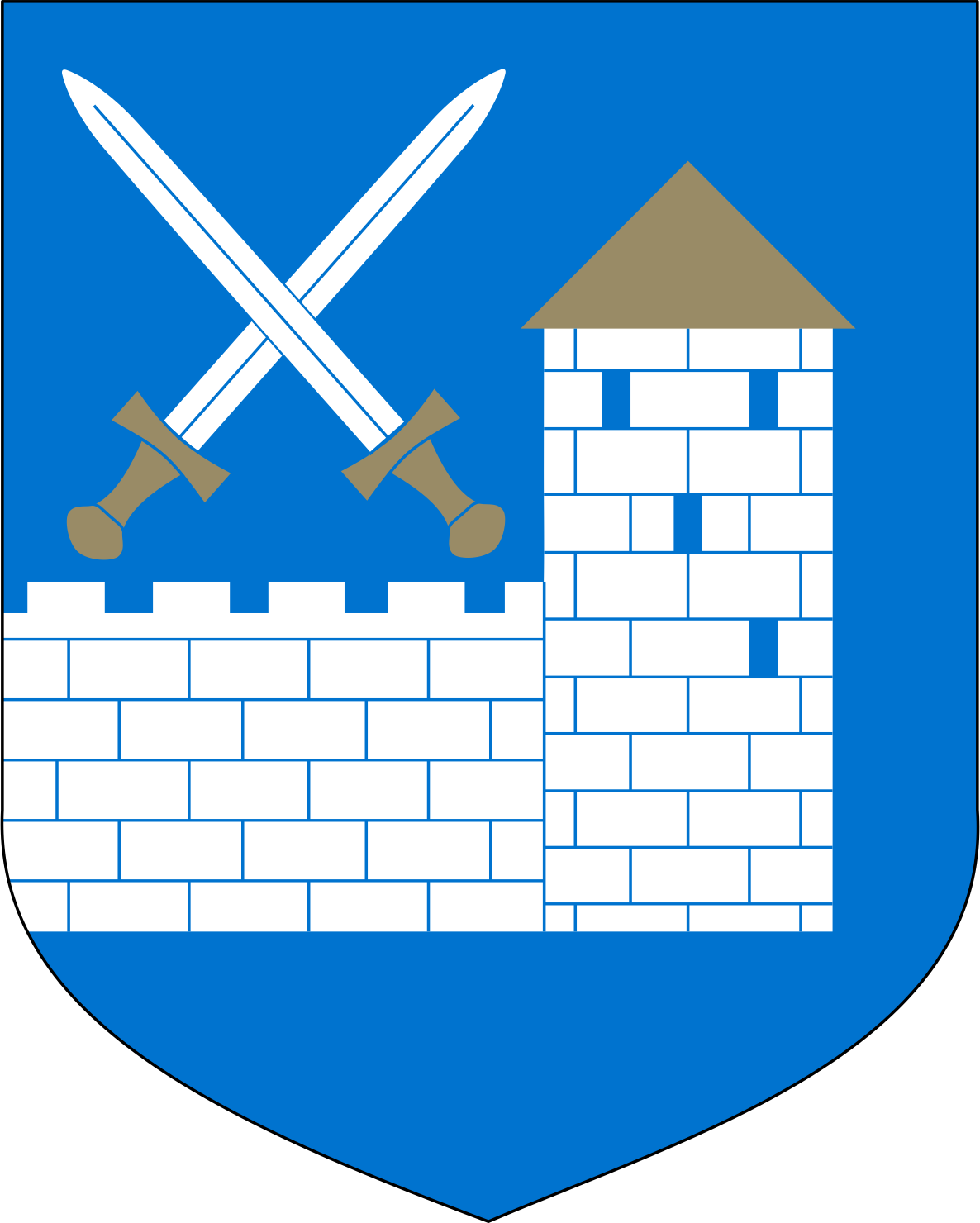 vapp